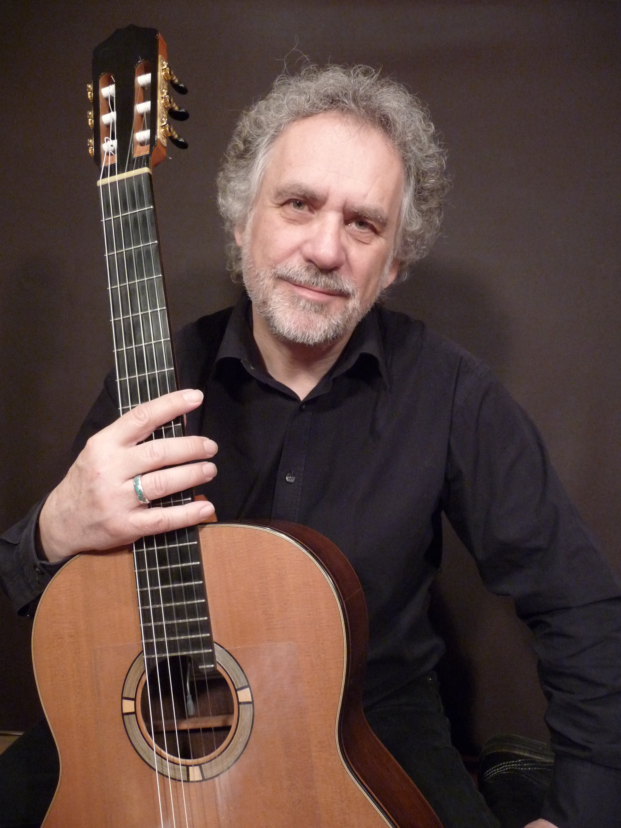 Jean Marie Raymond et sa guitare. Photo publicitaire